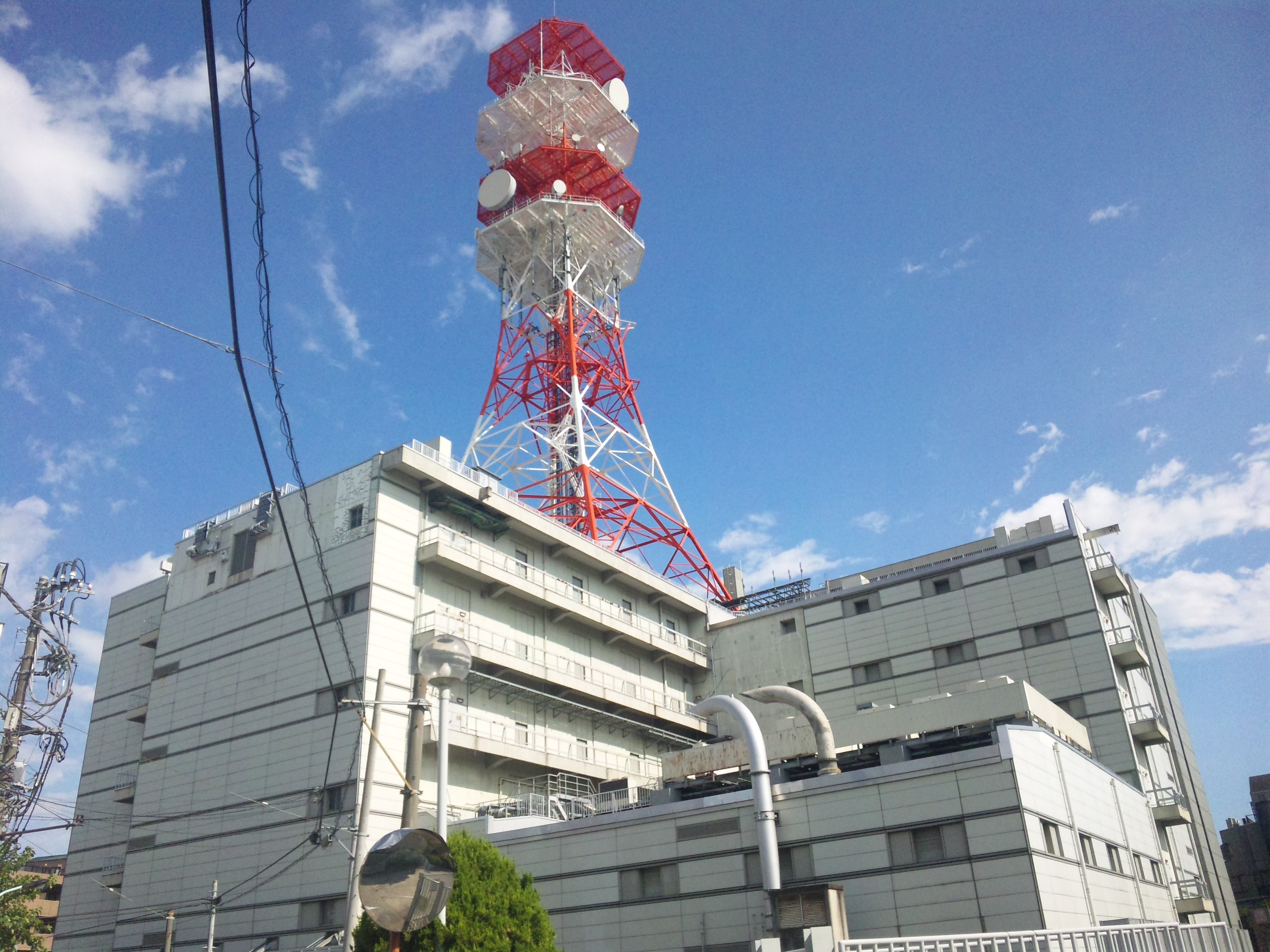 NTTコミュニケーションズからがさきビル